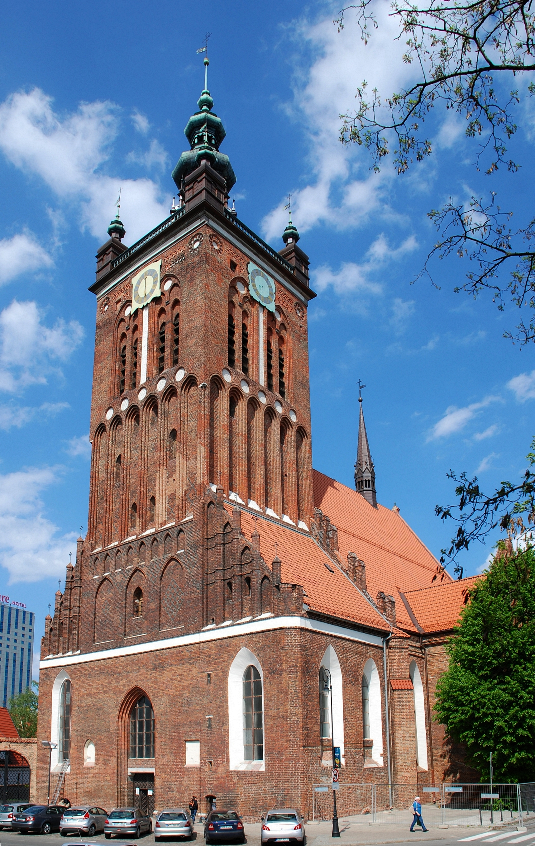 miasto Gdańsk